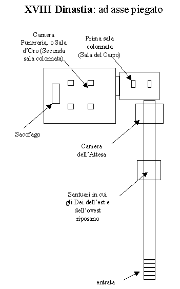 autore: Hotepibre; tipo di immagine: disegno; località e data: - - ; soggetto: Pianta schematica di una generica tomba della XVIII Dinastia nella Valle dei Re; prodotto SW utilizzato per la realizzazione: Power Point.